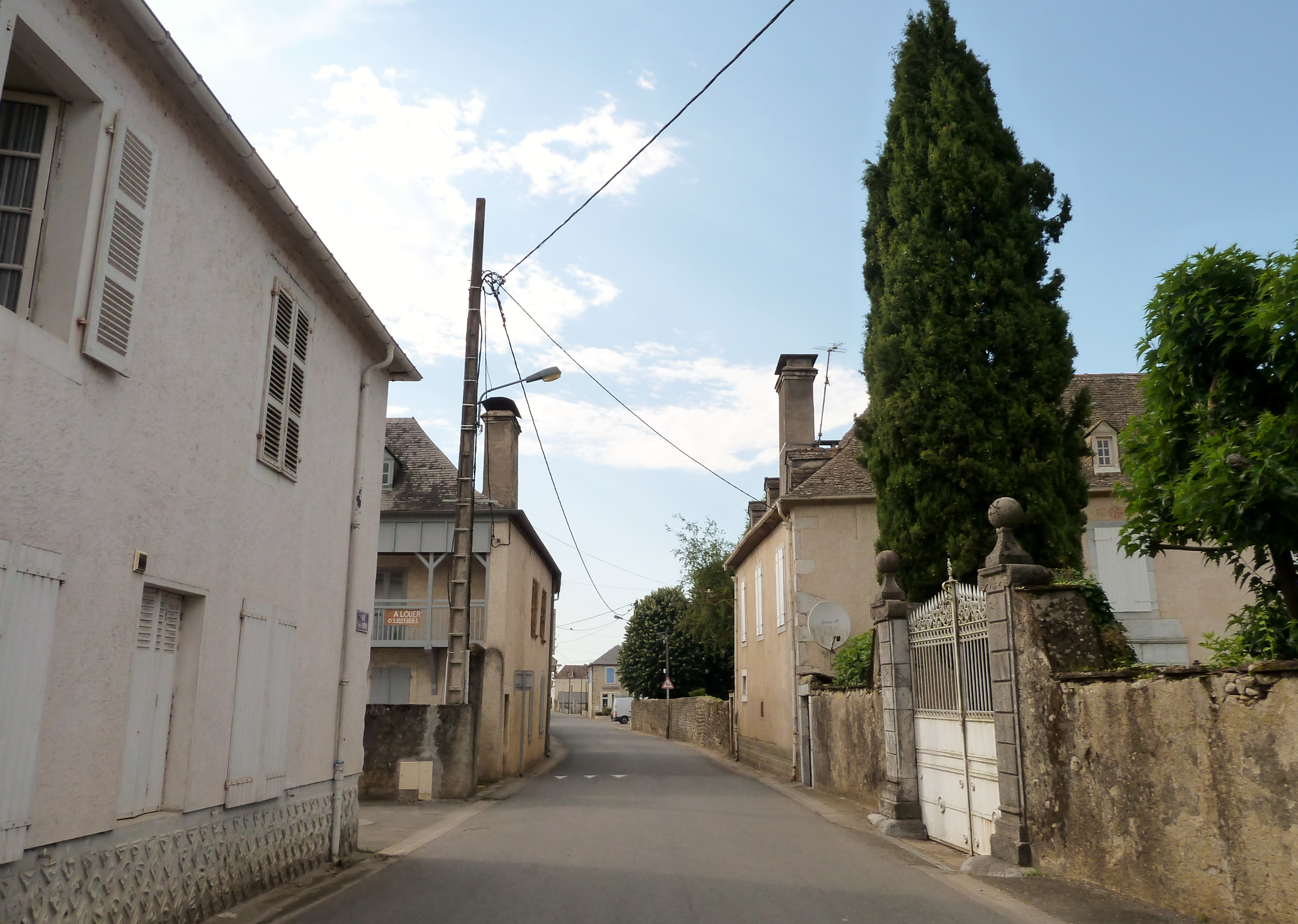 Beuste